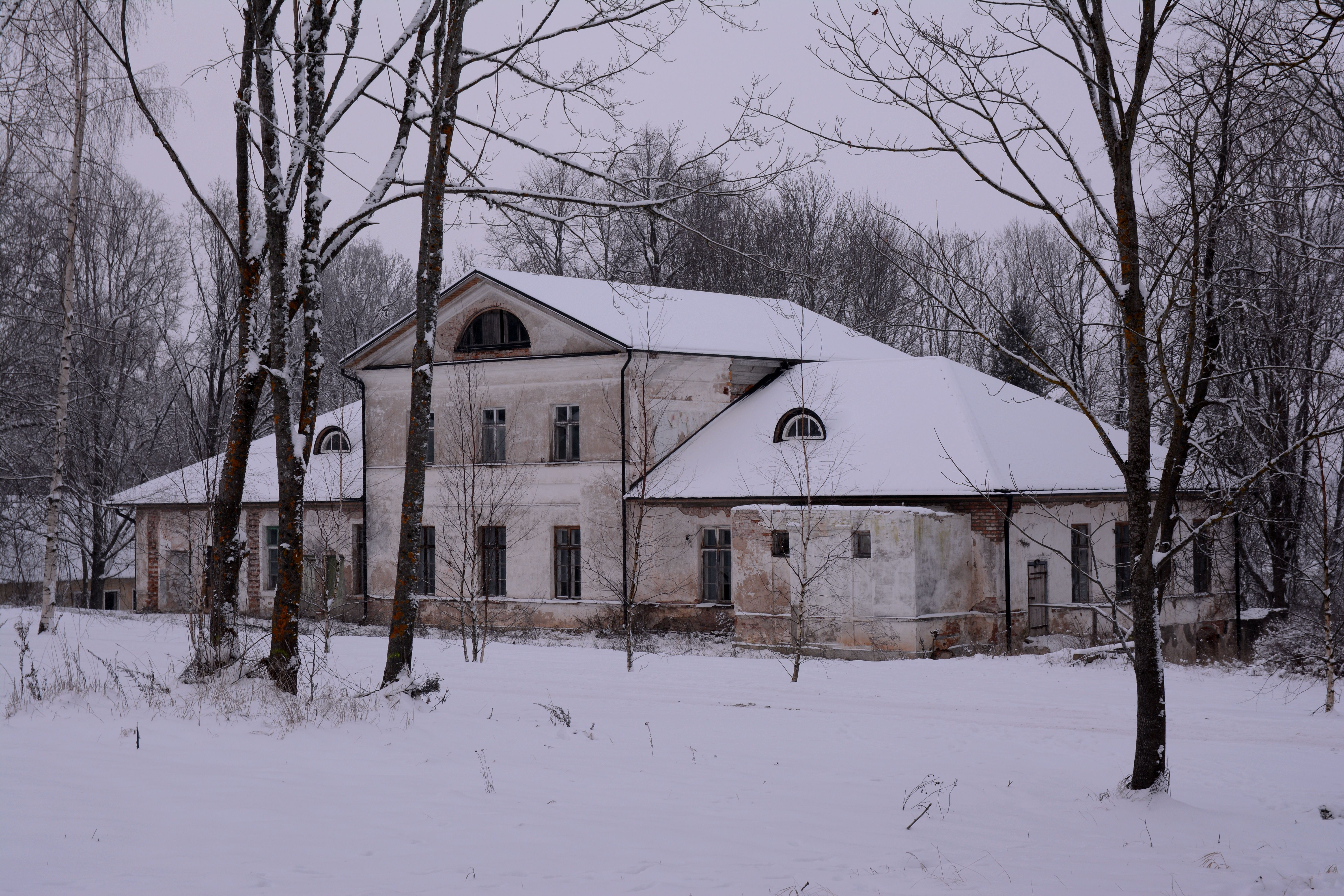 Sootaga mõisa peahoone